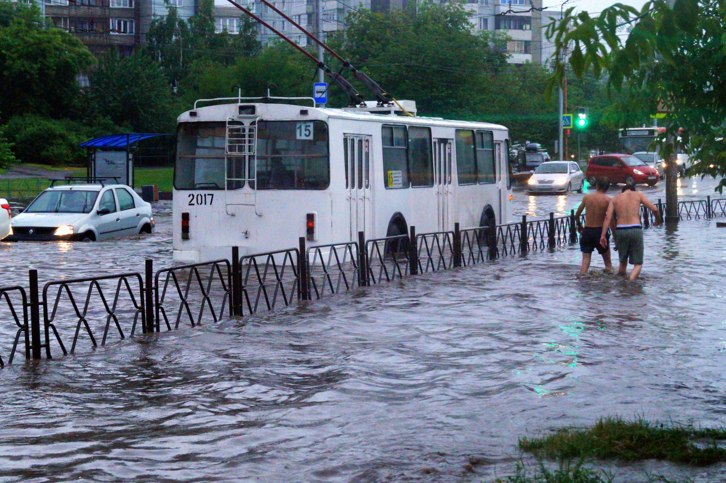 А просто летний дождь прошёл.